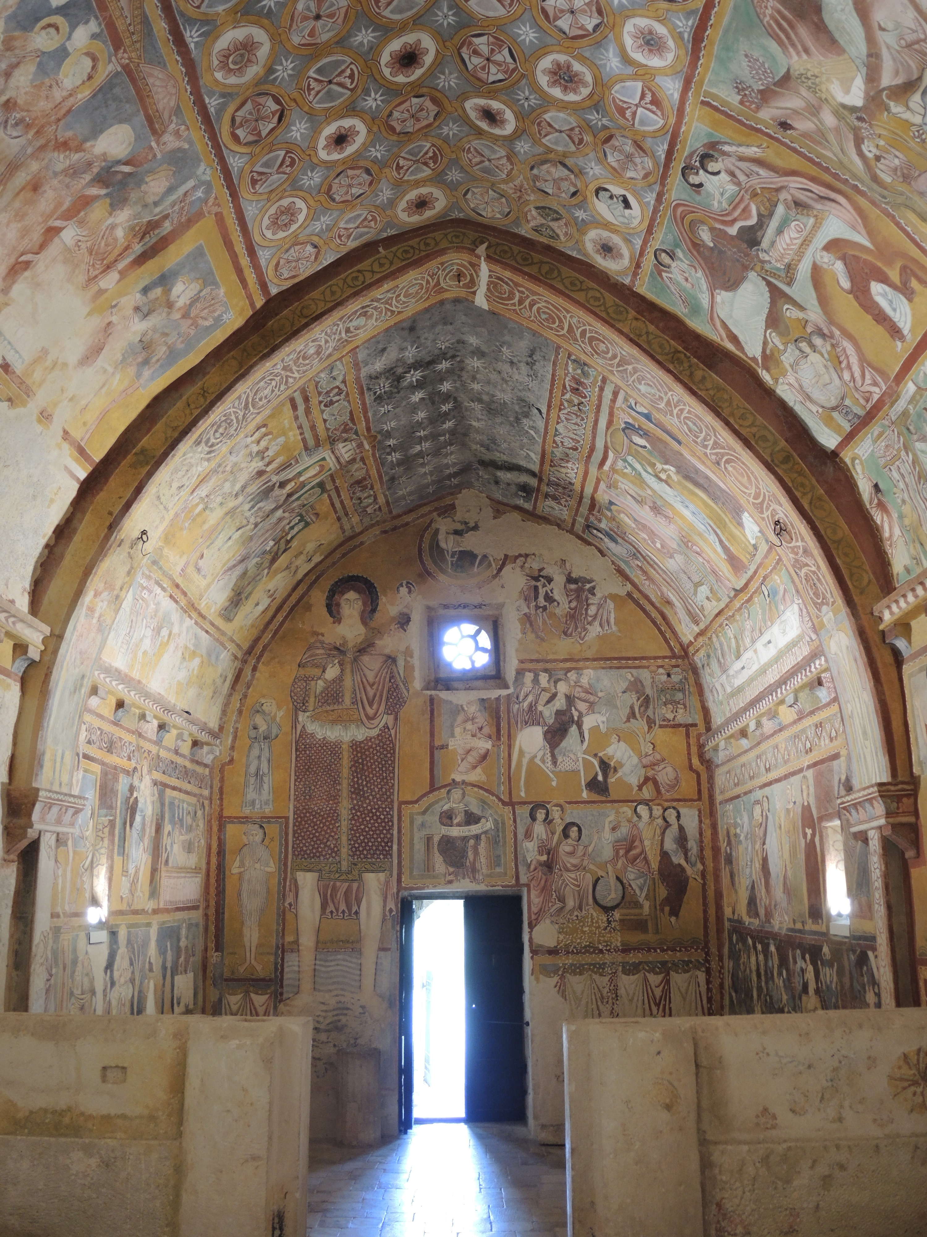 Bominaco: Oratorio di San Pellegrino